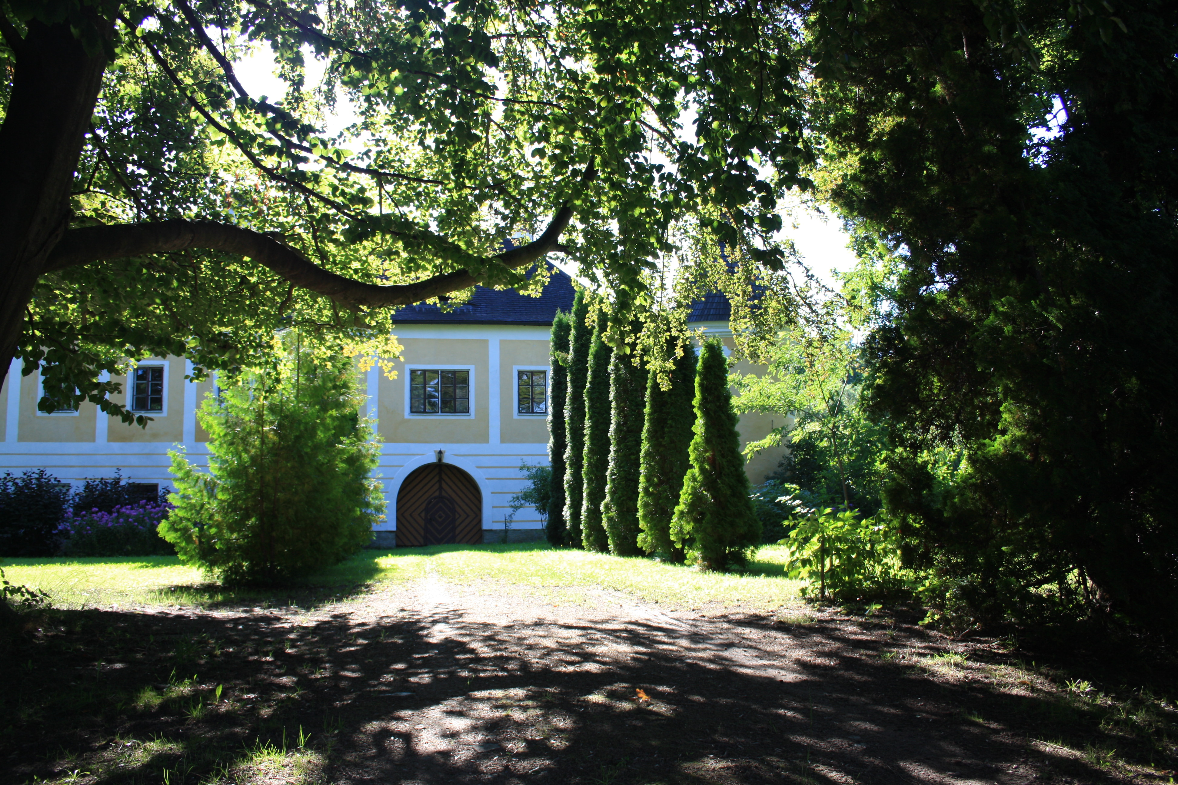 Ehemaliges Wasserschloss in Meires, Gemeinde Windigsteig, Bezirk Waidhofen/Thaya, Austria